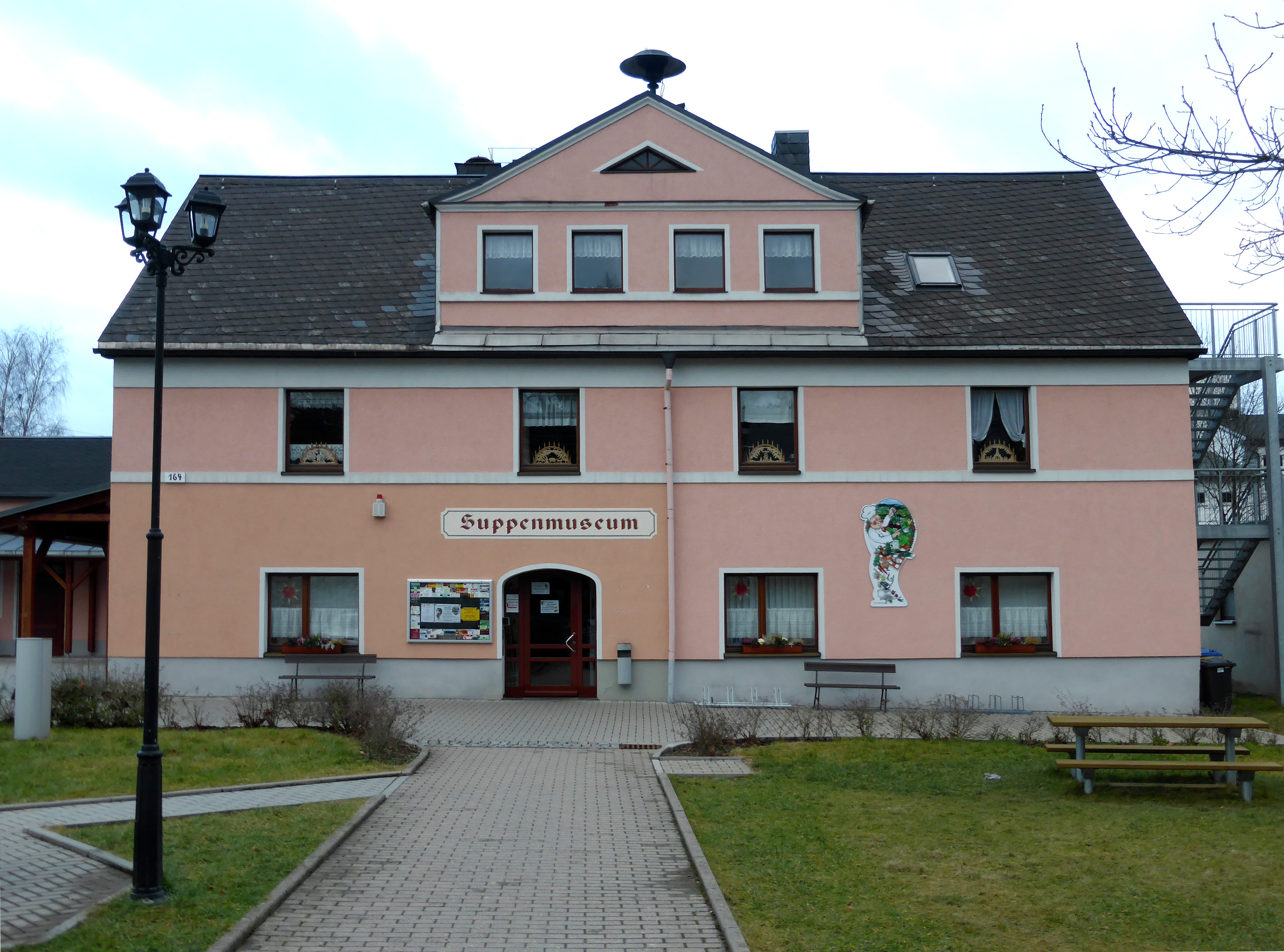 Suppenmuseum und Ortspyramide in Neudorf (Sehmatal), Erzgebirgskreis - Sachsen.